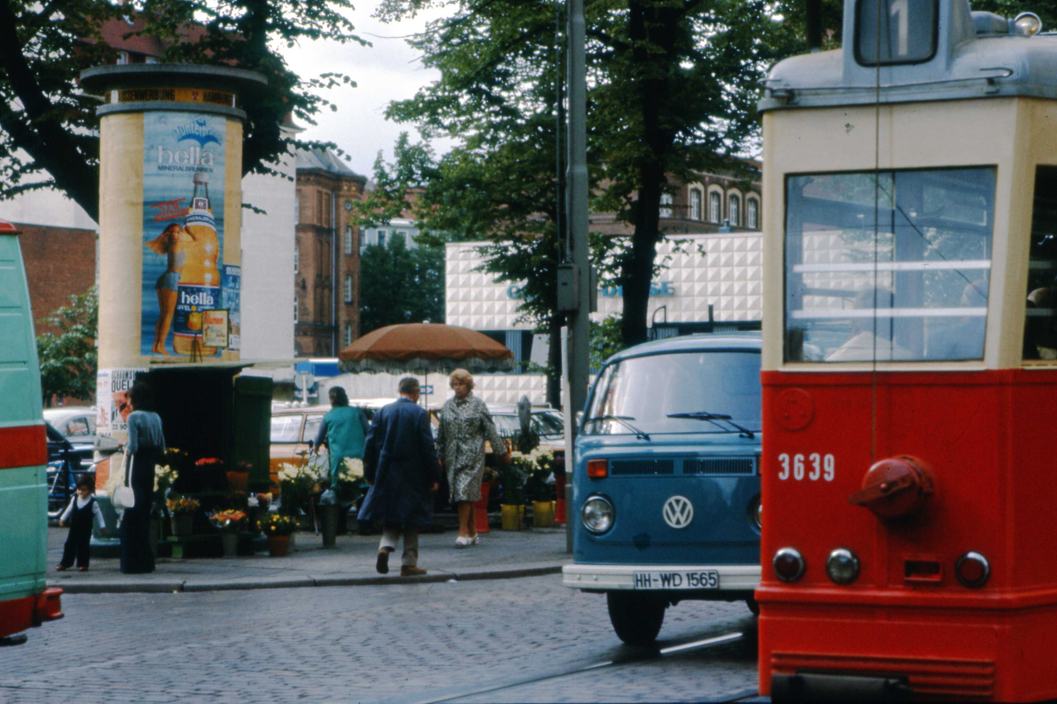 Blumenladen in der Litfaßsäule Lange Reihe